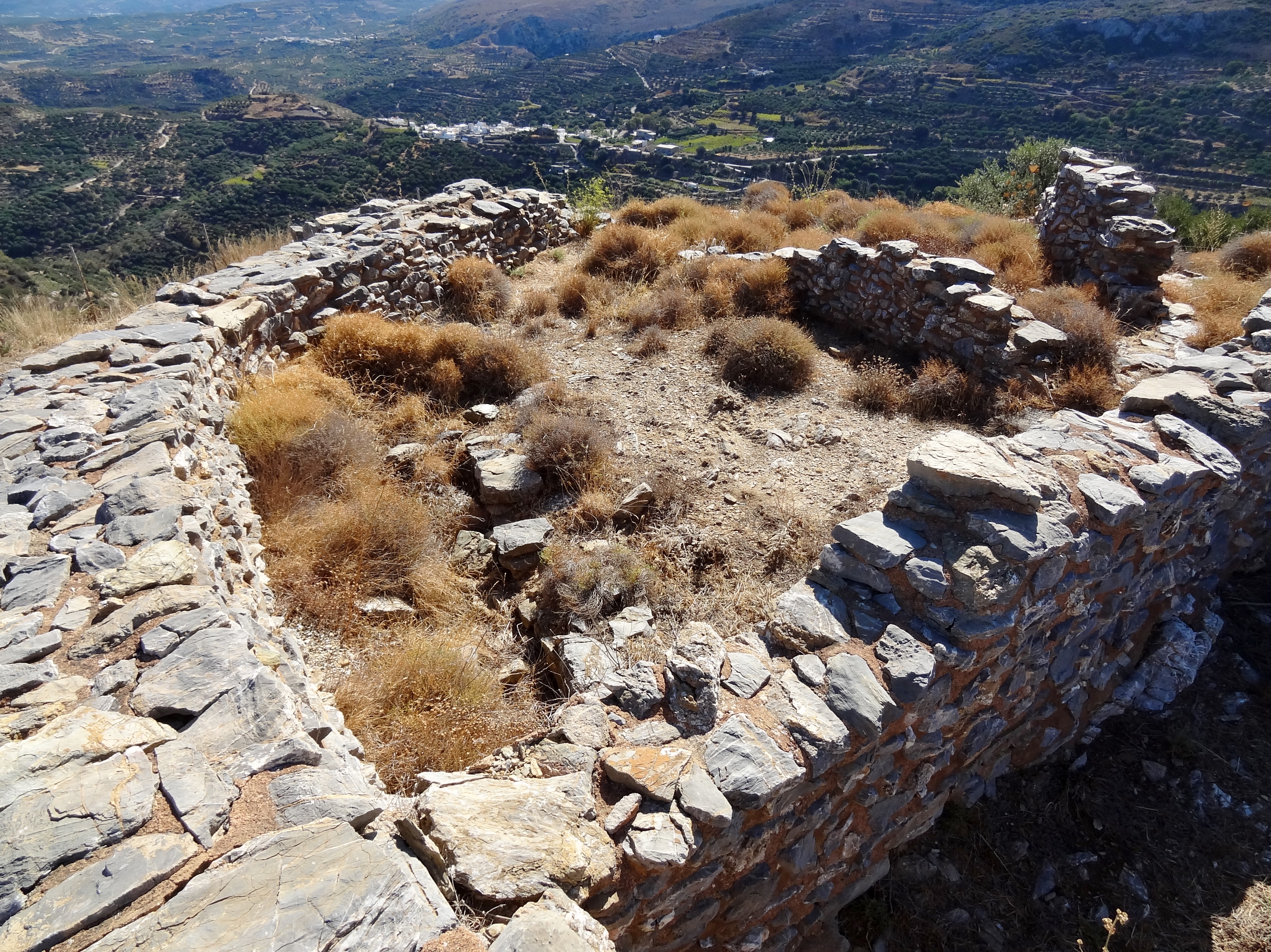 Ausgrabungsstätte des Minoischen Hauses von Chamaizi (Χαμαίζι), Gemeinde Sitia, Kreta, Griechenland